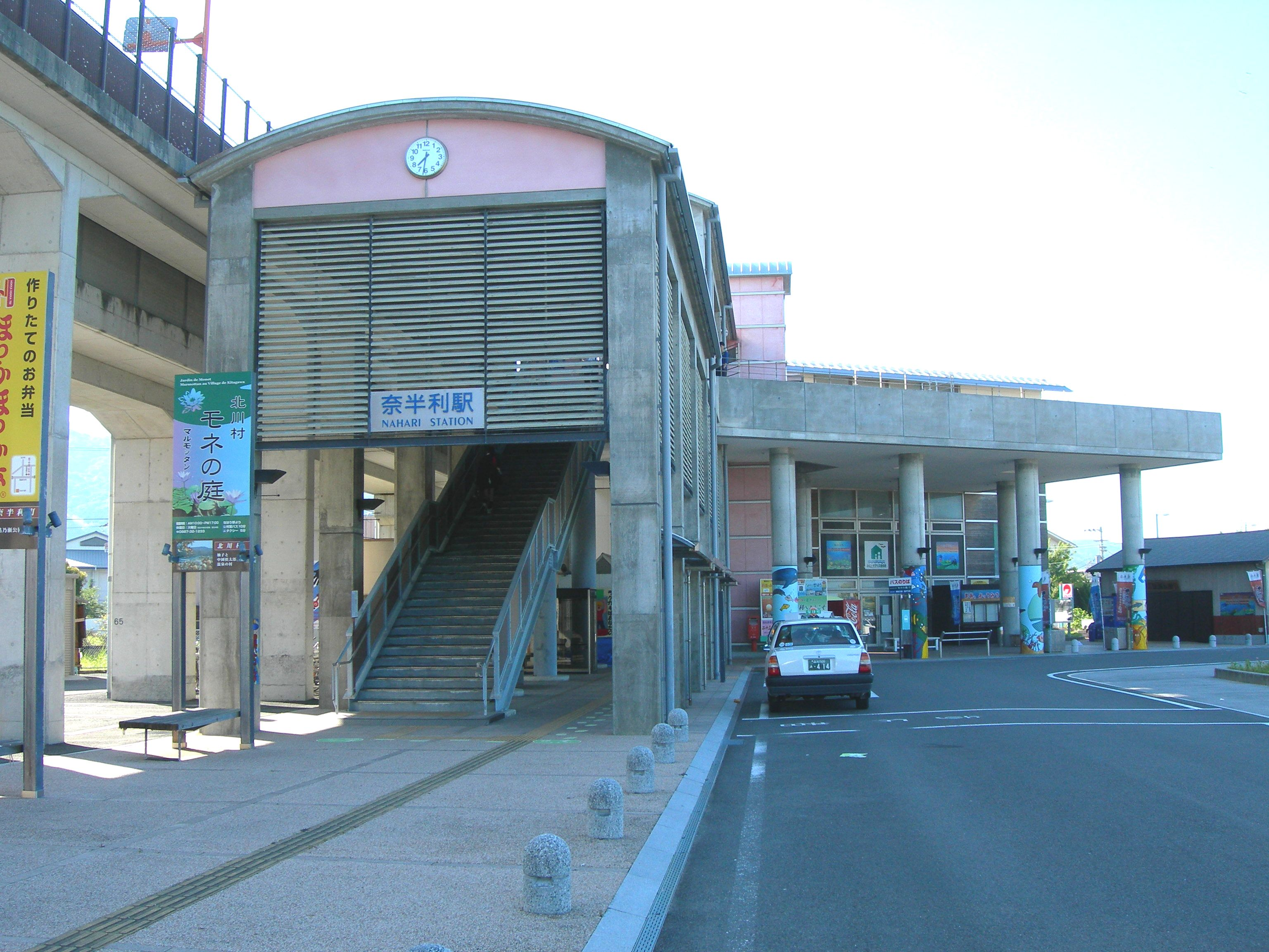 奈半利駅